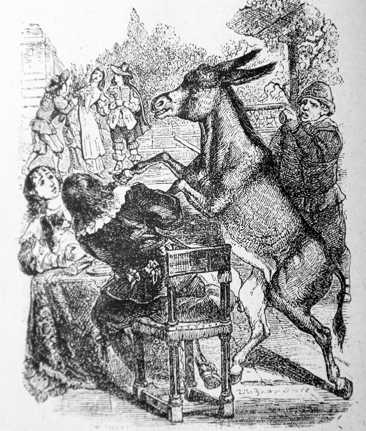 J.J. Grandville. Illustrations des Fables de La Fontaine. 1838-1840.